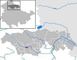 Thüringenhausen in Thuringia - Kyffhäuserkreis